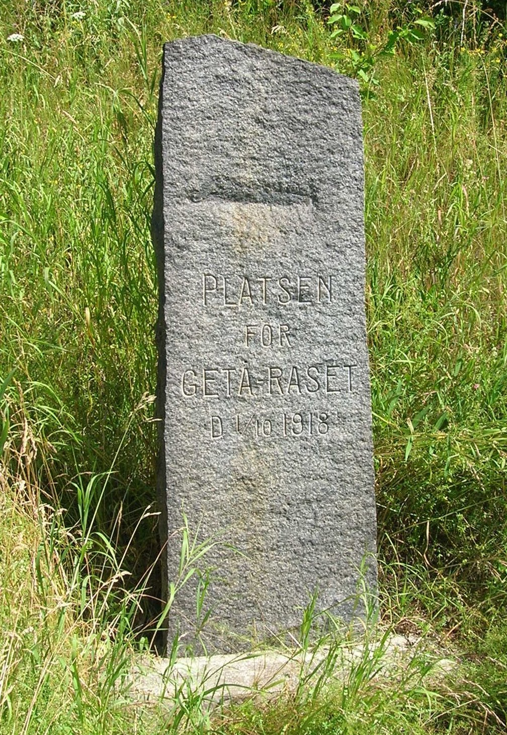 Minnesstenen över Getåolyckan invid olycksplatsen, Norrköpings kommun.